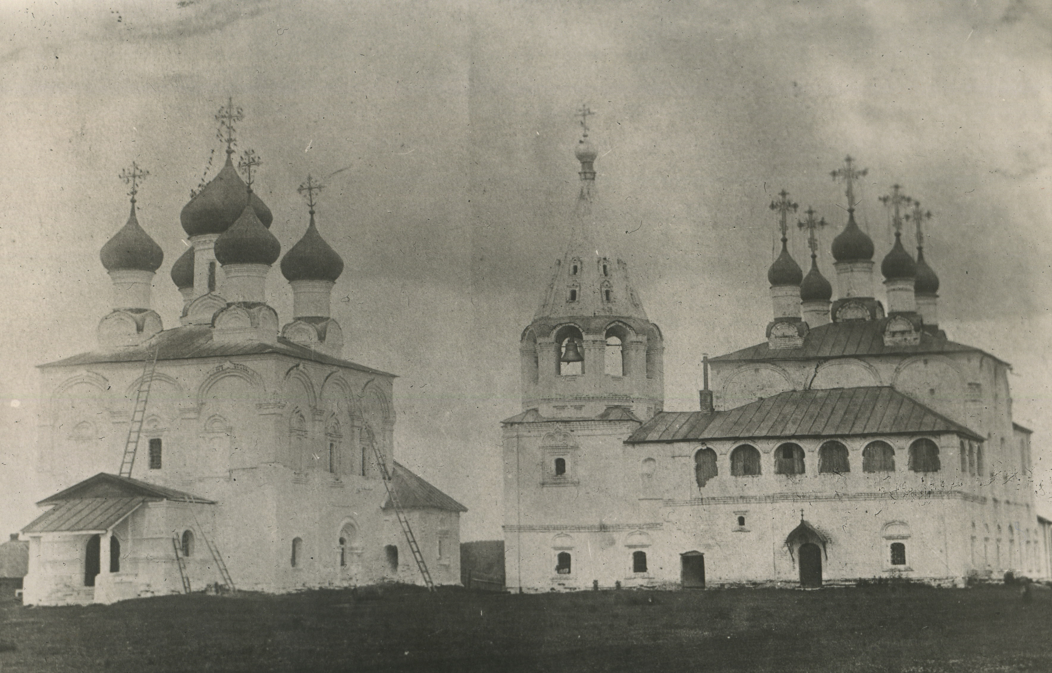 Монастырь в с. Борисоглеб под Муромом